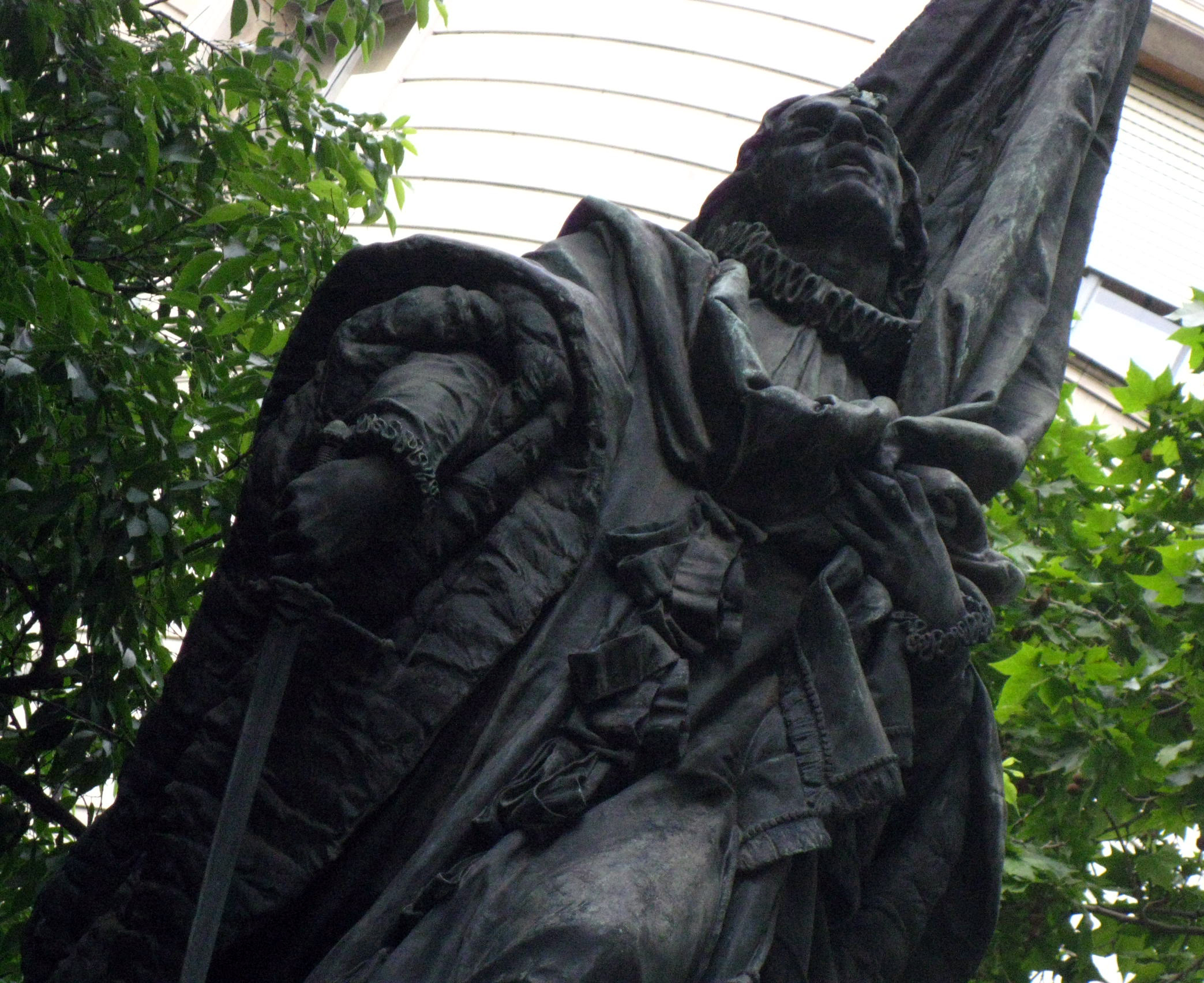 A Rafael Casanova (Rossend Nobas). Ronda de Sant Pere - c. Alí Bey (Barcelona)